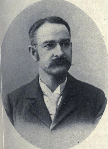 Lynds Jones